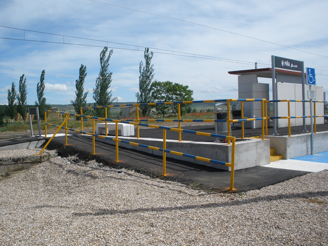 Piña de Campos (Palencia). Apeadero de RENFE